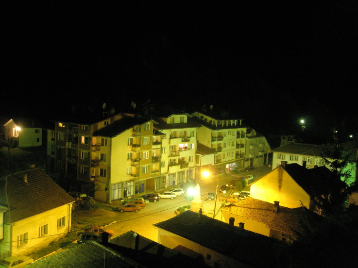 Crnа Travа nоću